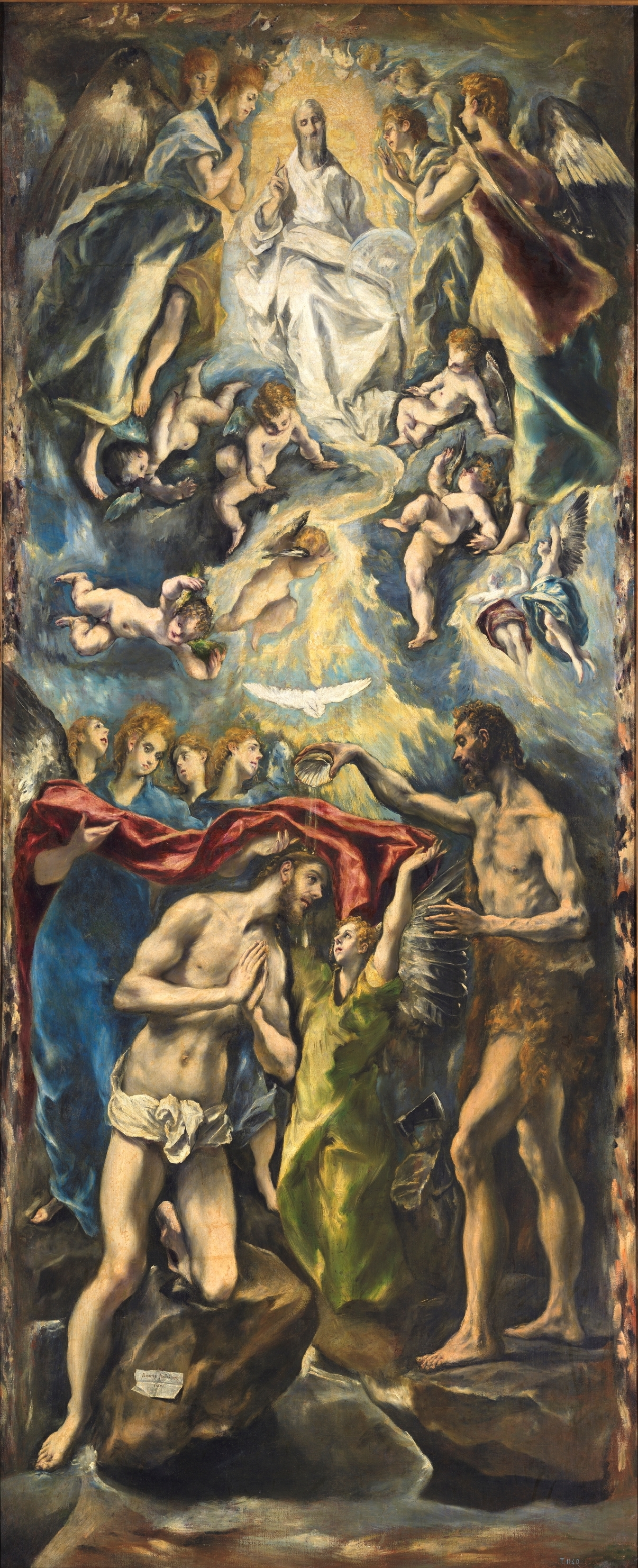 La obra representa el momento en que Jesucristo fue bautizado por el profeta San Juan Bautista.